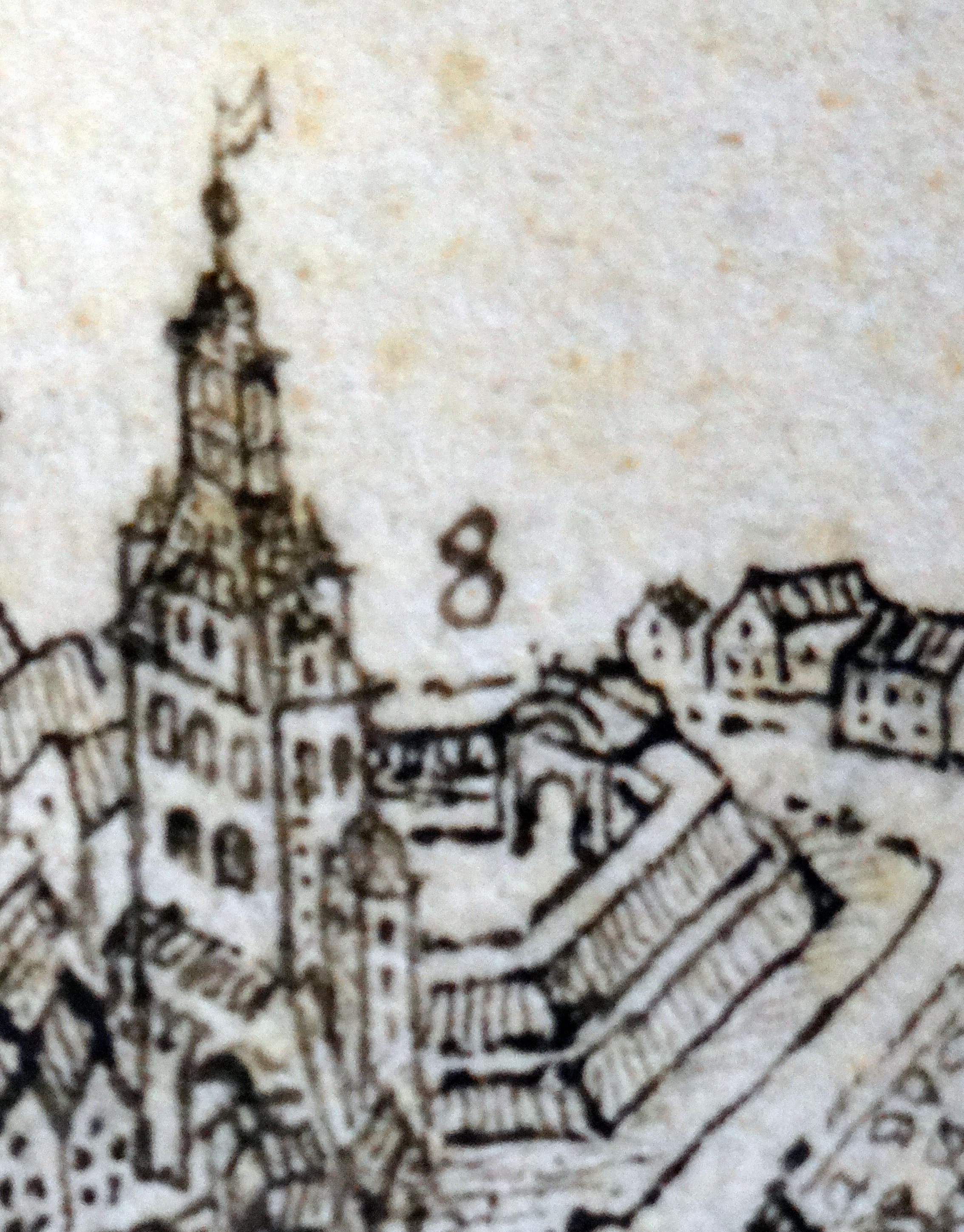 Martinspforte, Worms. Detail aus: Peter Hamman: Ansicht der Stadt Worms im Zustand vor 1689 von Osten (Rheinfront). Stadtarchiv Worms, Abt. 1B, Nr. 48.